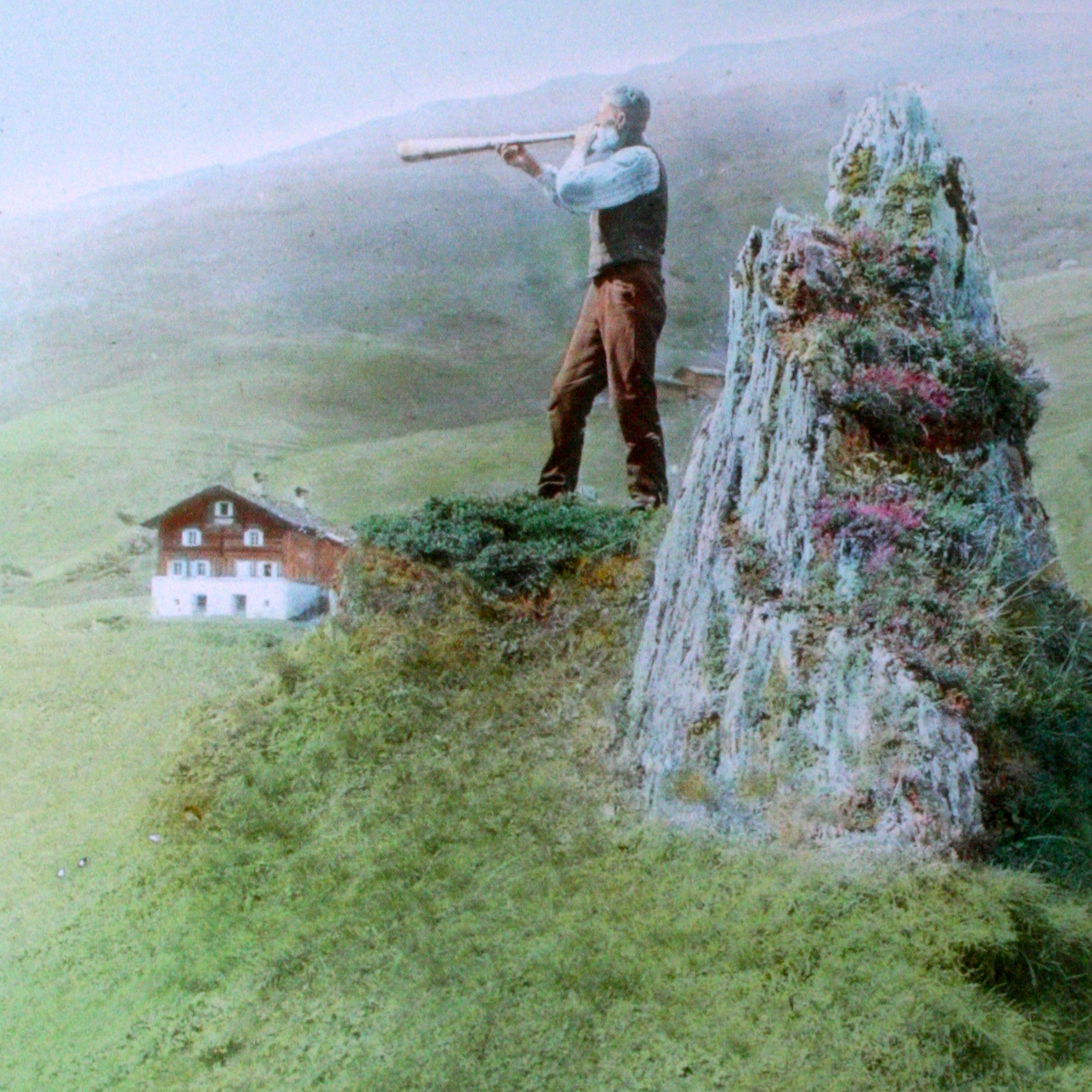 Hirte mit Tiba im Safiental beim Turrahus, 1910